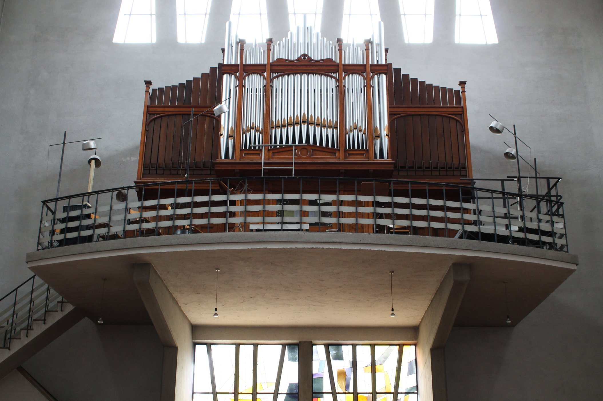 Orgel von St. Wolfgang in München (1907, A. Keates, III/28, Wiederaufbau 2004 von Johannes Führer)